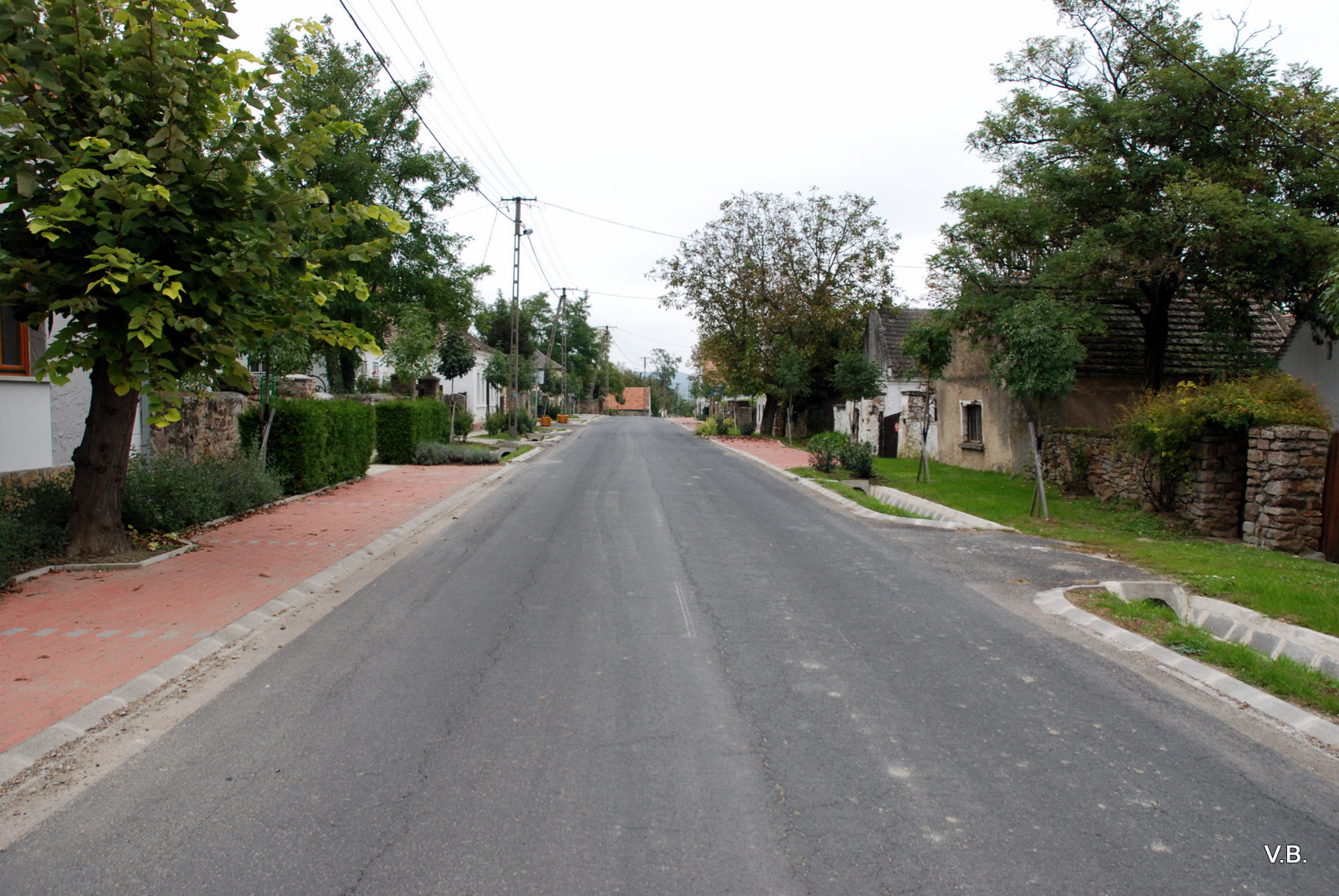 Деревня, музей средневековья. Фото Виктора Белоусова.